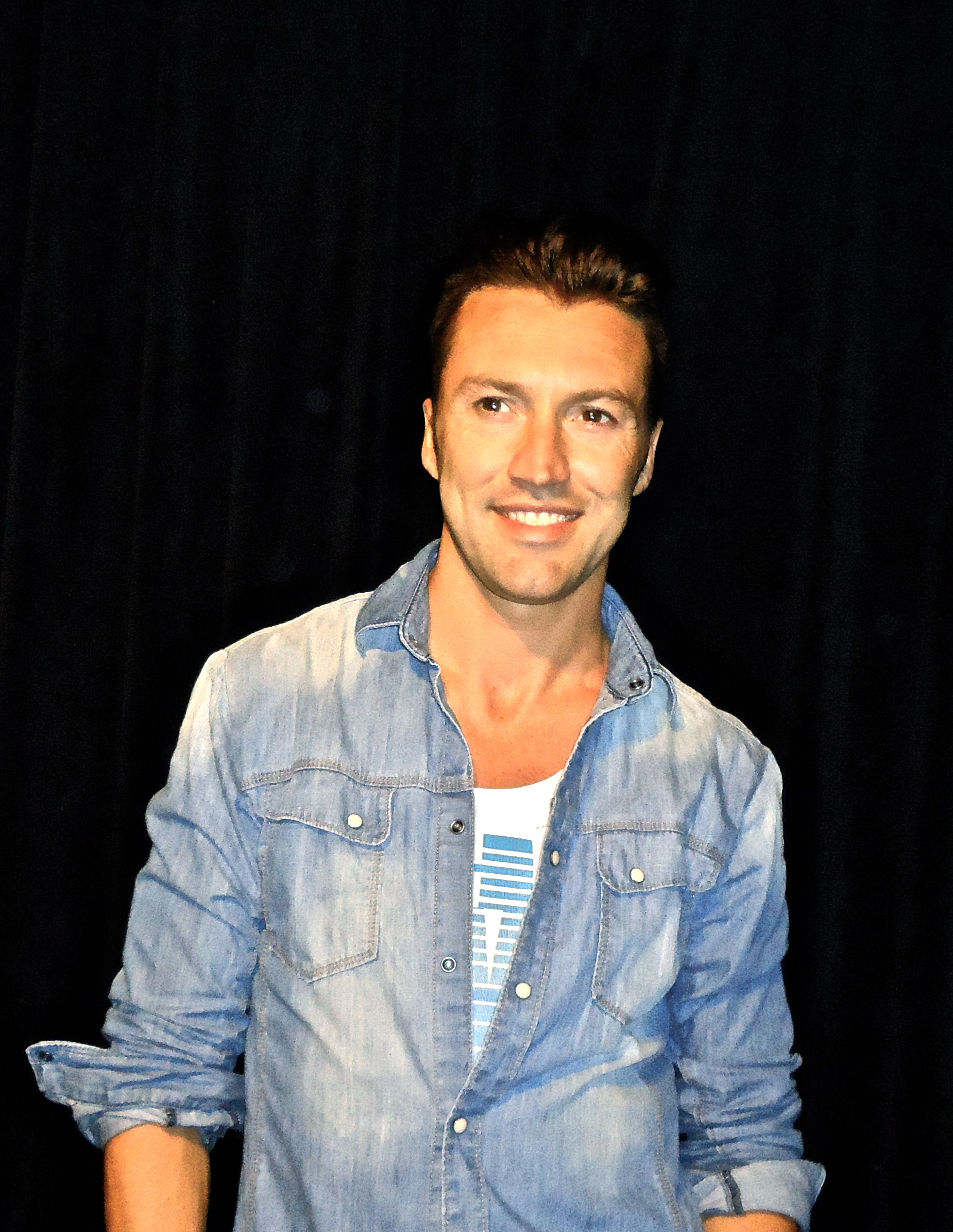 Robin Pors (Vlaardingen, 1 januari 1978) is een Nederlands zanger. Hij maakte vanaf 1997 deel uit van de Vengaboys.